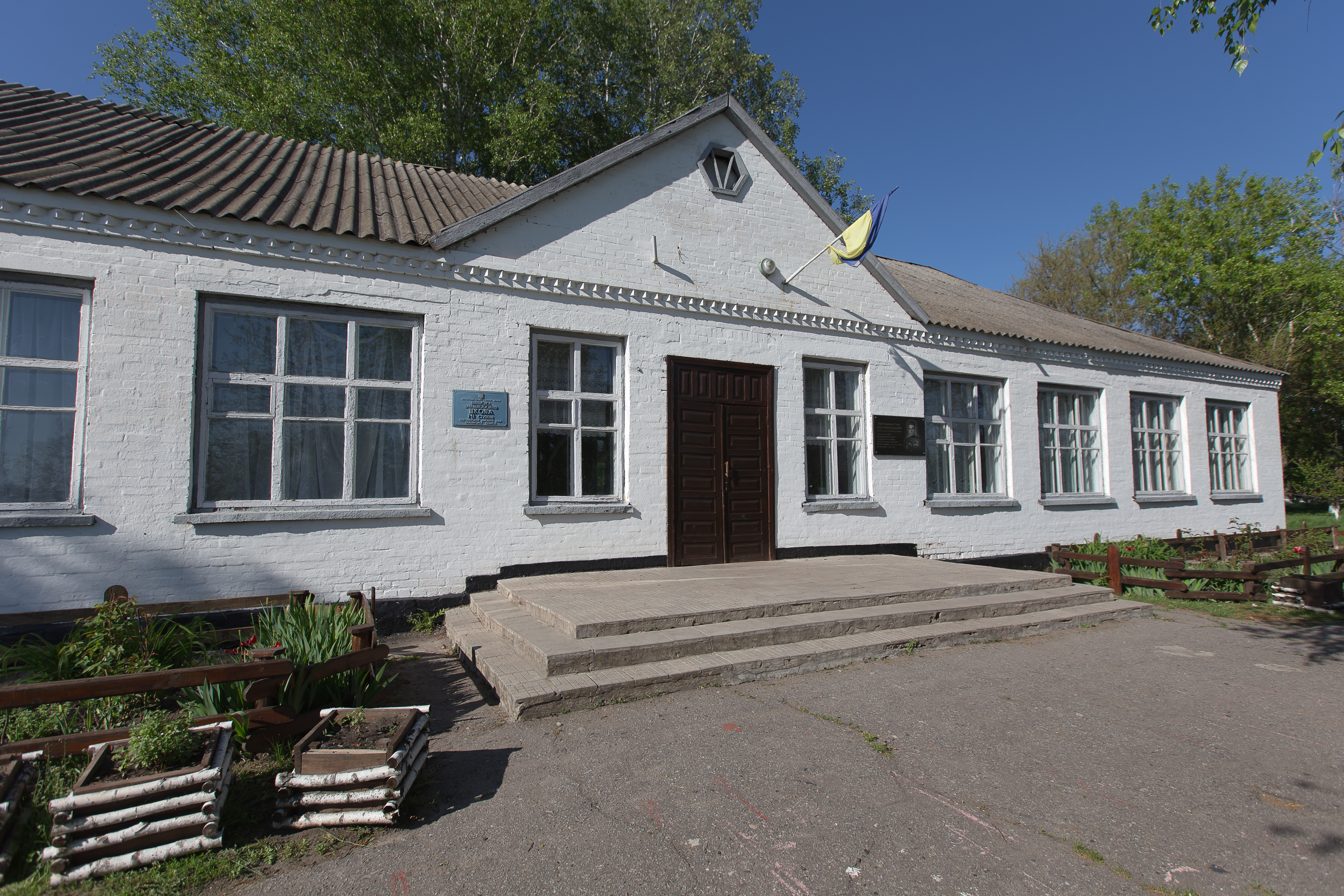 Шилівська Загальноосвітня школа І-ІІ ступенів, Полтавської області.